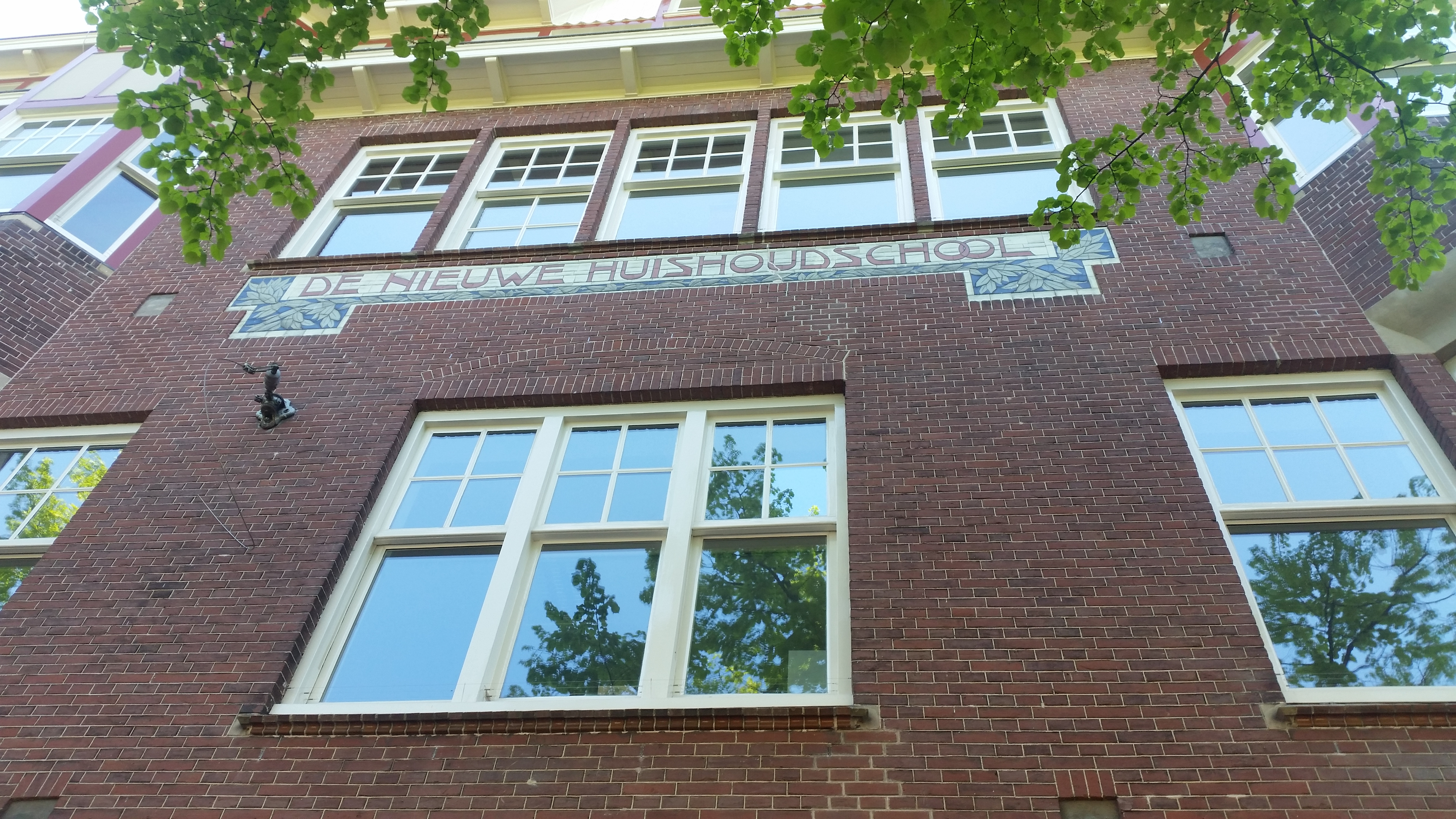 Impressie van Gabriël Metsustraat 8, Amsterdam-Zuid van Leliman (april 2020)